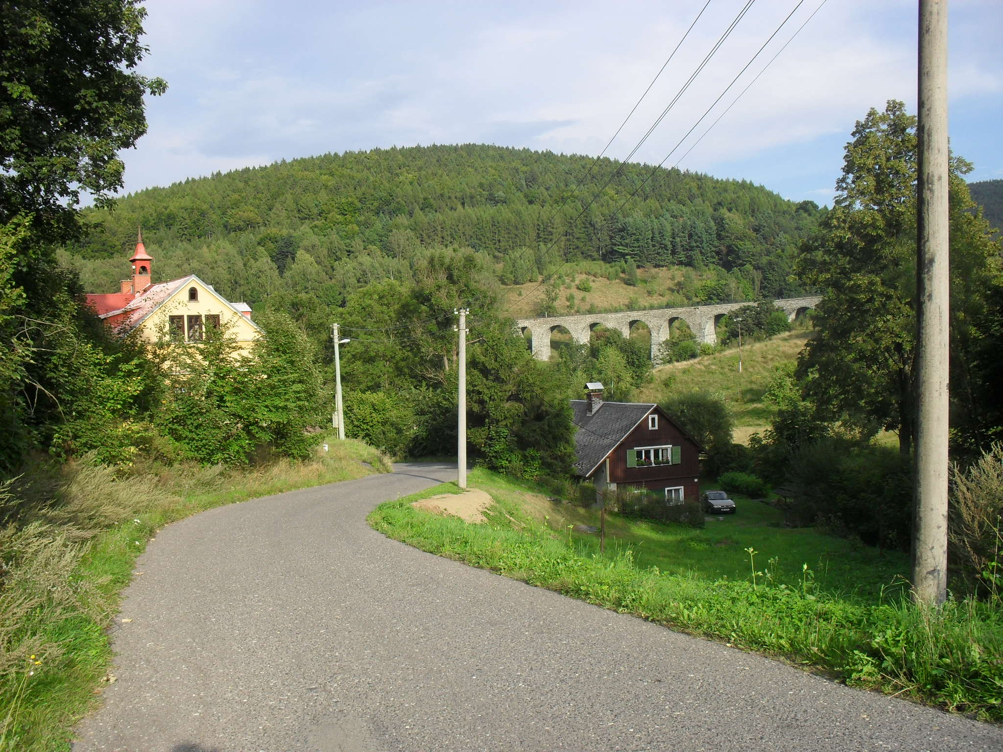 Pohled na Novinu ze silnice od Křižan, vzadu Novinský viadukt